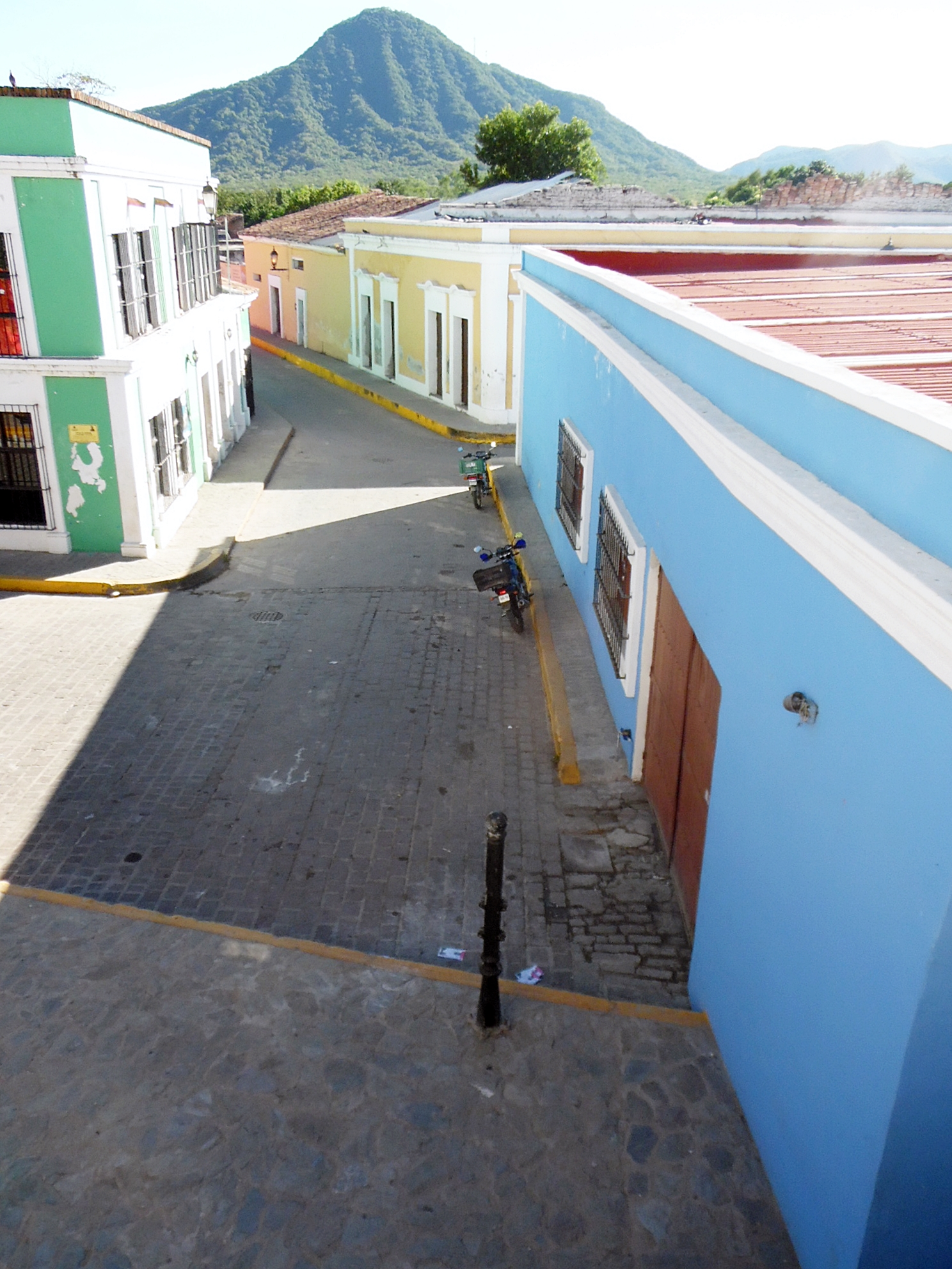 Vista de las calles de Cosalá desde la Iglesia de Santa Úrsula